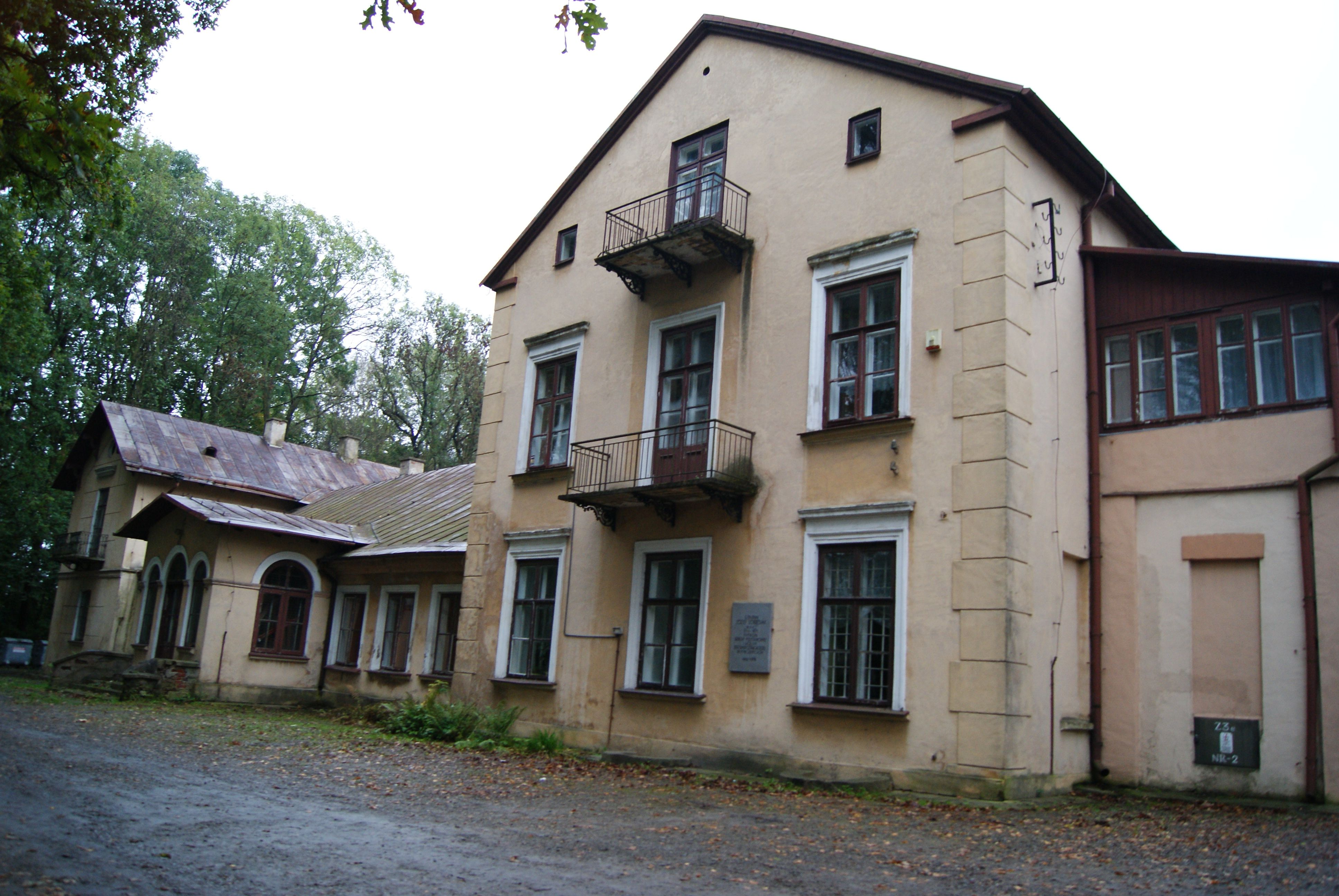 Zespół dworski w Rybczewicach